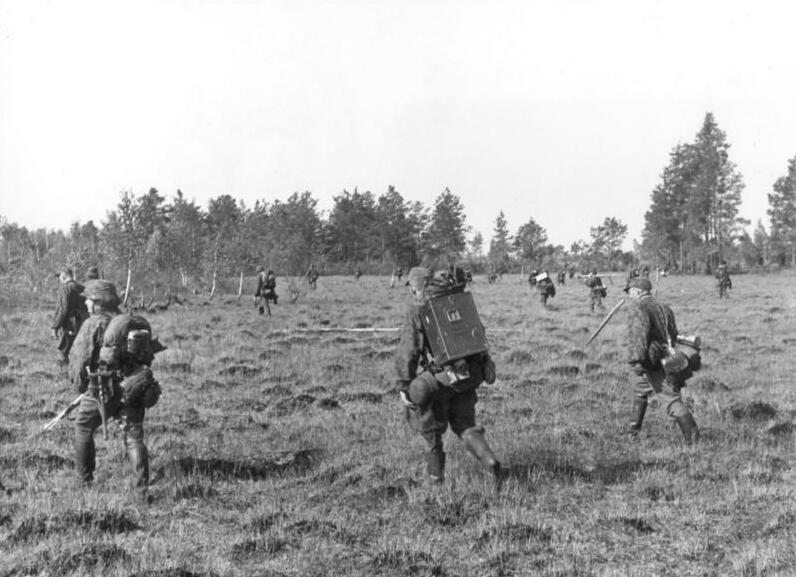 Sowjetunion, SS-Reiter bei Mosyr im Einsatz gegen Partisanen Scherl: Bandenjagd im nassen Dreieck: Der Vormarsch beginnt. Durch versumpfte Felder und Wälder gehen die SS-Reiter vor, dauernd nach allen Seiten spähend. Ort: Mosyr, Datum: Mai 43, Bildberichter: SS-PK Obermüller 2917-43 ADN-ZB-Archiv II.Weltkrieg 1939 -45 In den von den faschistischen deutschen Truppen besetzten Gebieten der Sowjetunion; Mai 1943 Partisanenbekämpfung im sogenannten "nassen Dreieck" bei Mosyr - die SS-reiter beginnen den Vormarsch durch versumpfte Felder und Wälder. Aufnahme: Obermüller 2917-43